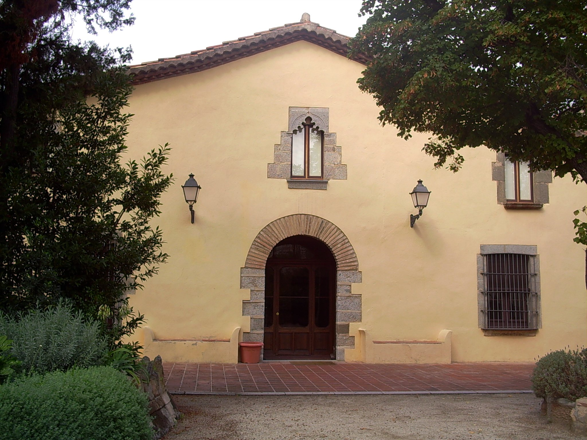 Portal de Can Banús, seu del Museu Municipal, a Vilassar, el Maresme, (Catalunya).